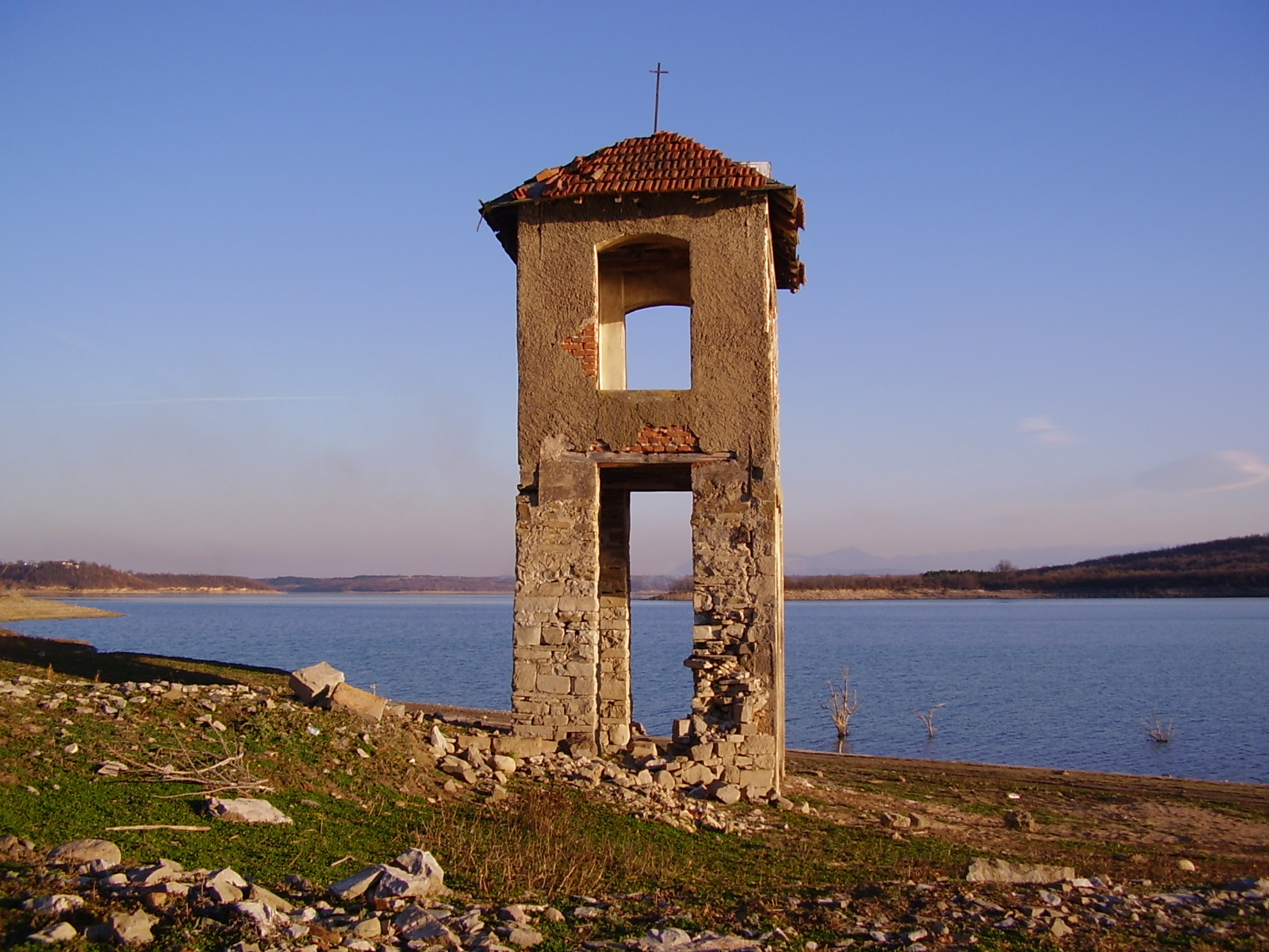 Църква "Св. Възнесение", Област Монтана, България